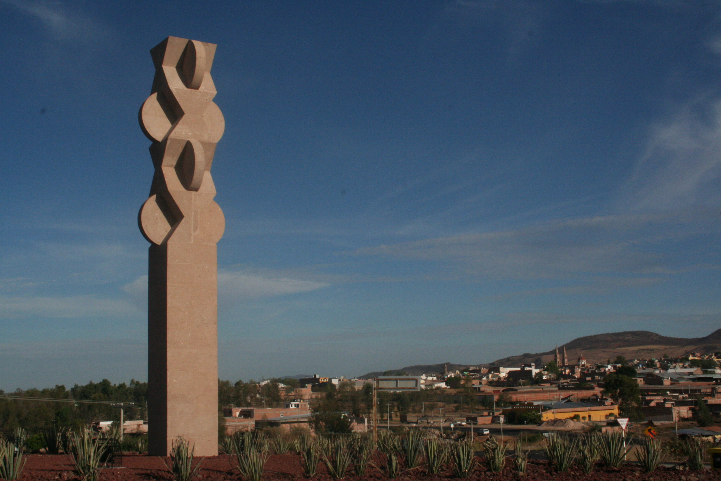 [Obra creada magistralmente en cantera. Diseño del Maestro Vicente Rojo, y llevada a cabo por el Cantero Degolladense Javier Méndez. Inaugurada en Febrero de 2007 por el Presidente Municipal Juan Jose Serrato Guzmán. Mide 16 metros, y se encuentra resguardando la entrada sur de la población de Degollado, Jalisco. Esta escultura, es la primera de una serie de escultura en cantera, diseños de artistas plásticos renombrados, que habrá esparcidas por la población.]